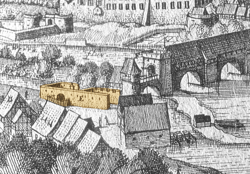 Hospital St. Spiritus, nachträglich koloriert, Merian zeigt den falschen Standort des Hospitals links der Brücke, rechts davon wäre richtig gewesen.